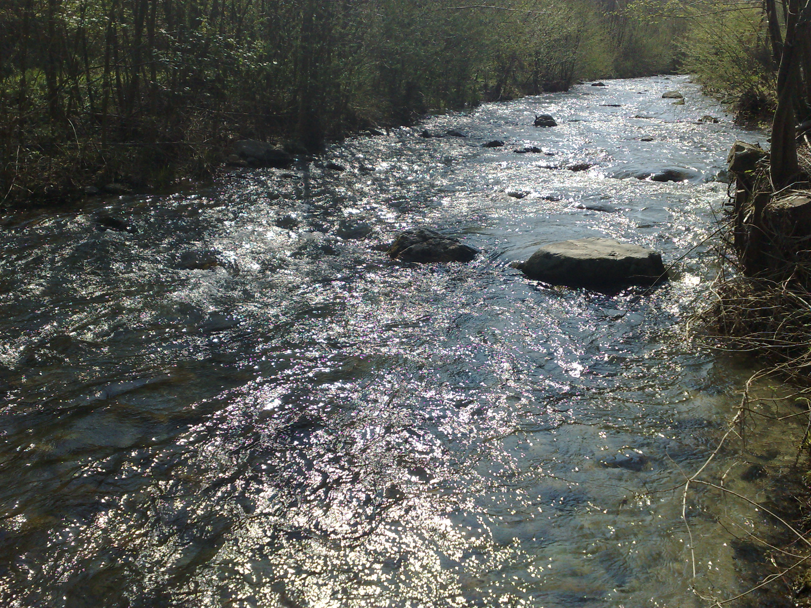 Il Fiume Bormida, presso Pallare.